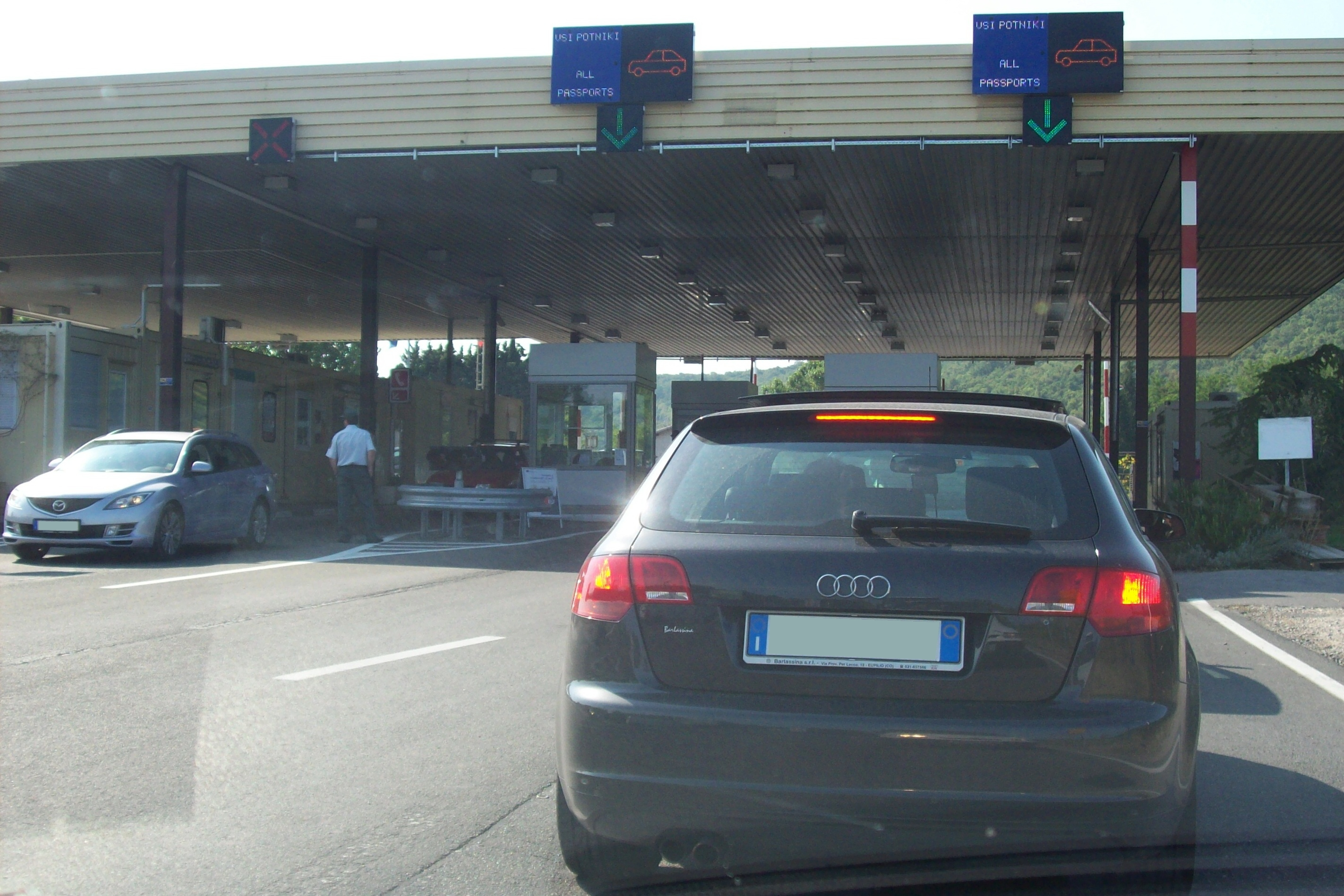 Sečovlje (Slovenija) - mednarodni mejni prehod Sečovlje (Slovenia) - international border crossing